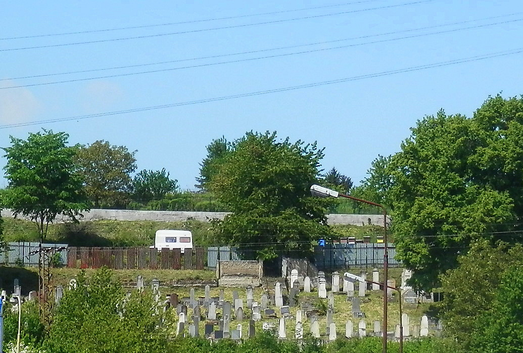 Ortodoxný židovský cintorín nad obchodným domom Tesco, Volgogradská ulica, sídlisko III. Pochádza z roku 1890.